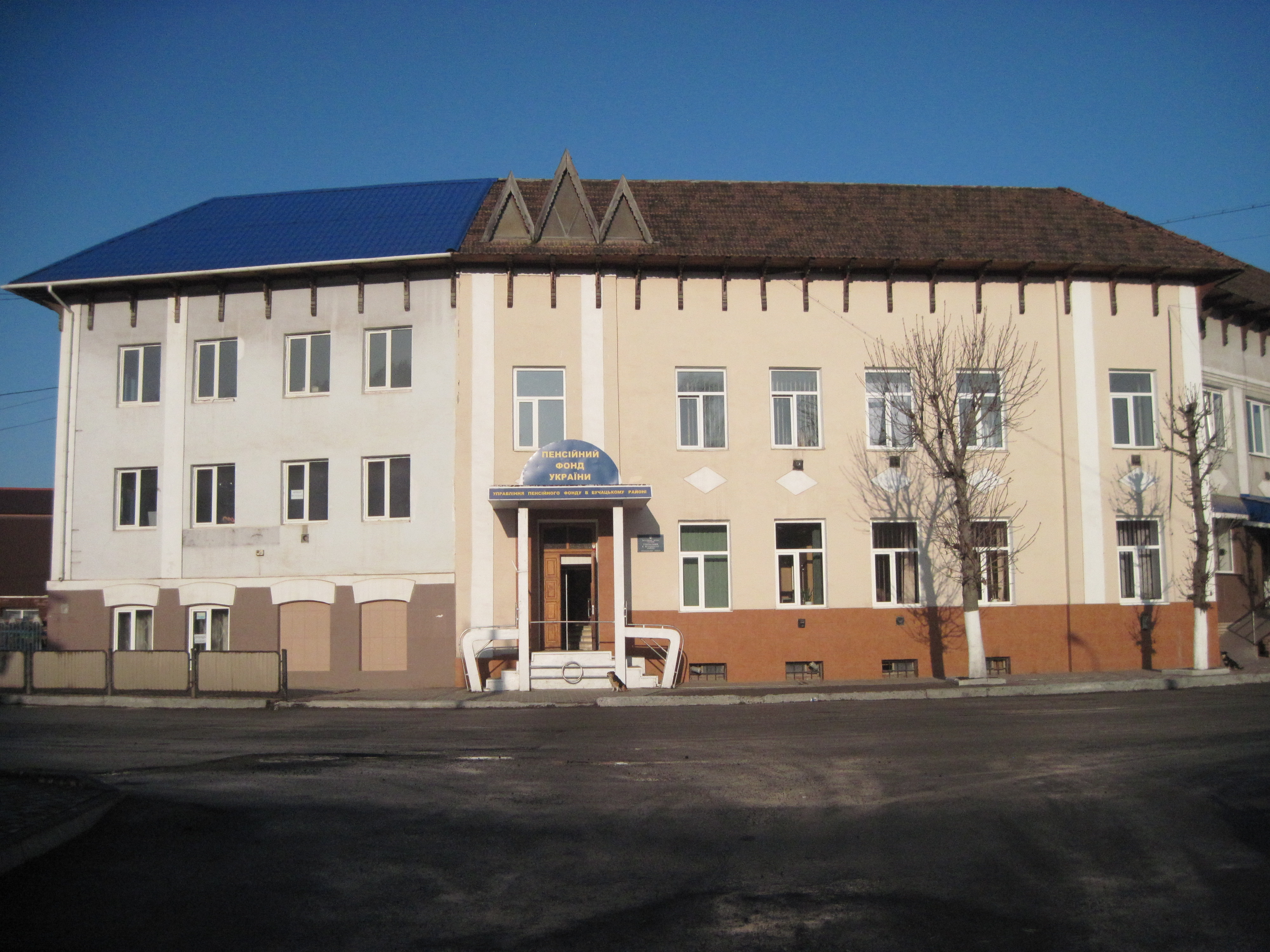 Будівля відділення Пенсійного фонду. Бучач, осінь 2013